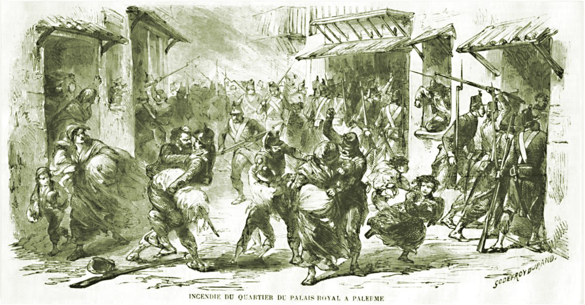 Palermo, 27 maggio 1860. Truppe borboniche si abbandonano alla violenza e al saccheggio nei confronti della popolazione civile degli abitati posti tra Porta di Castro e Piazzetta Grande, incendiando il quartiere a sud del Palazzo Reale.